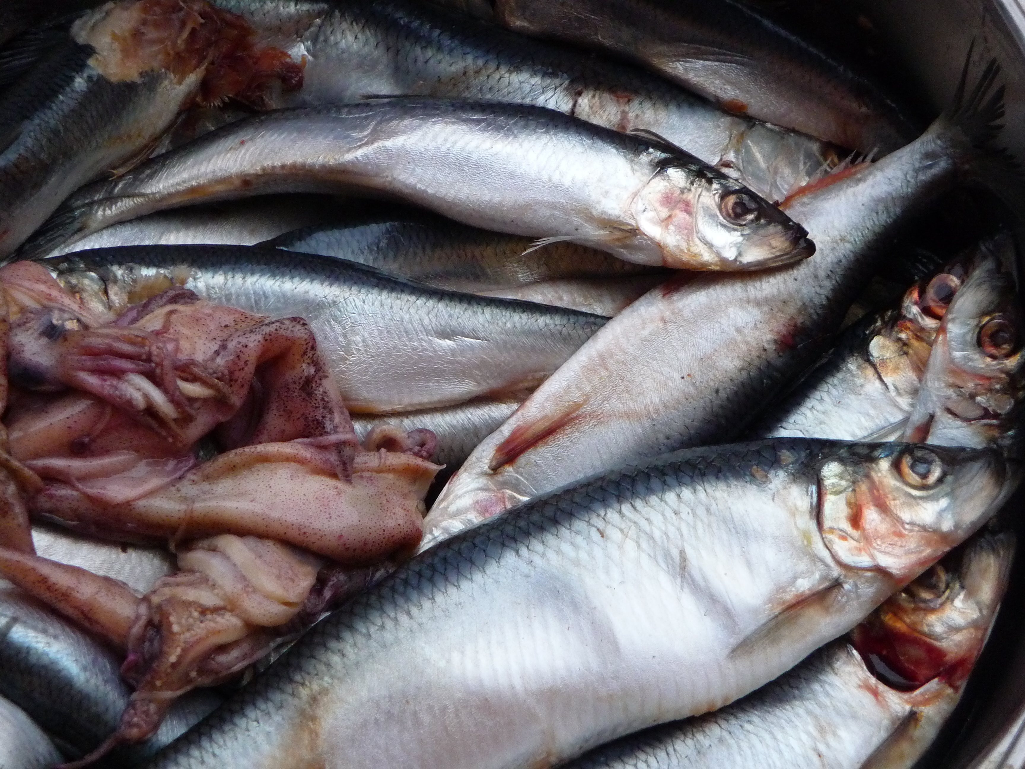 Heringe und Tintenfisch als Futter für Robben